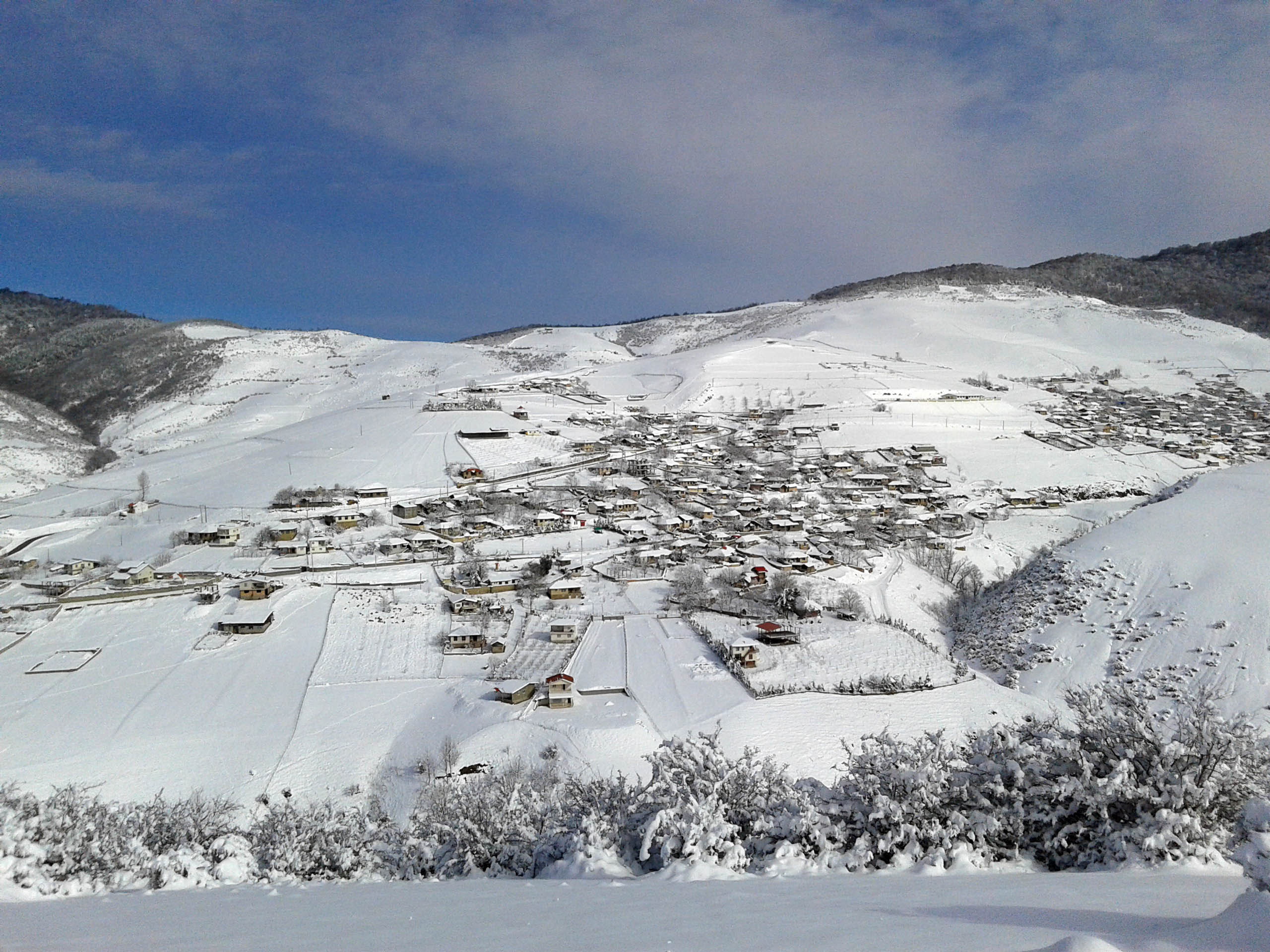 برف